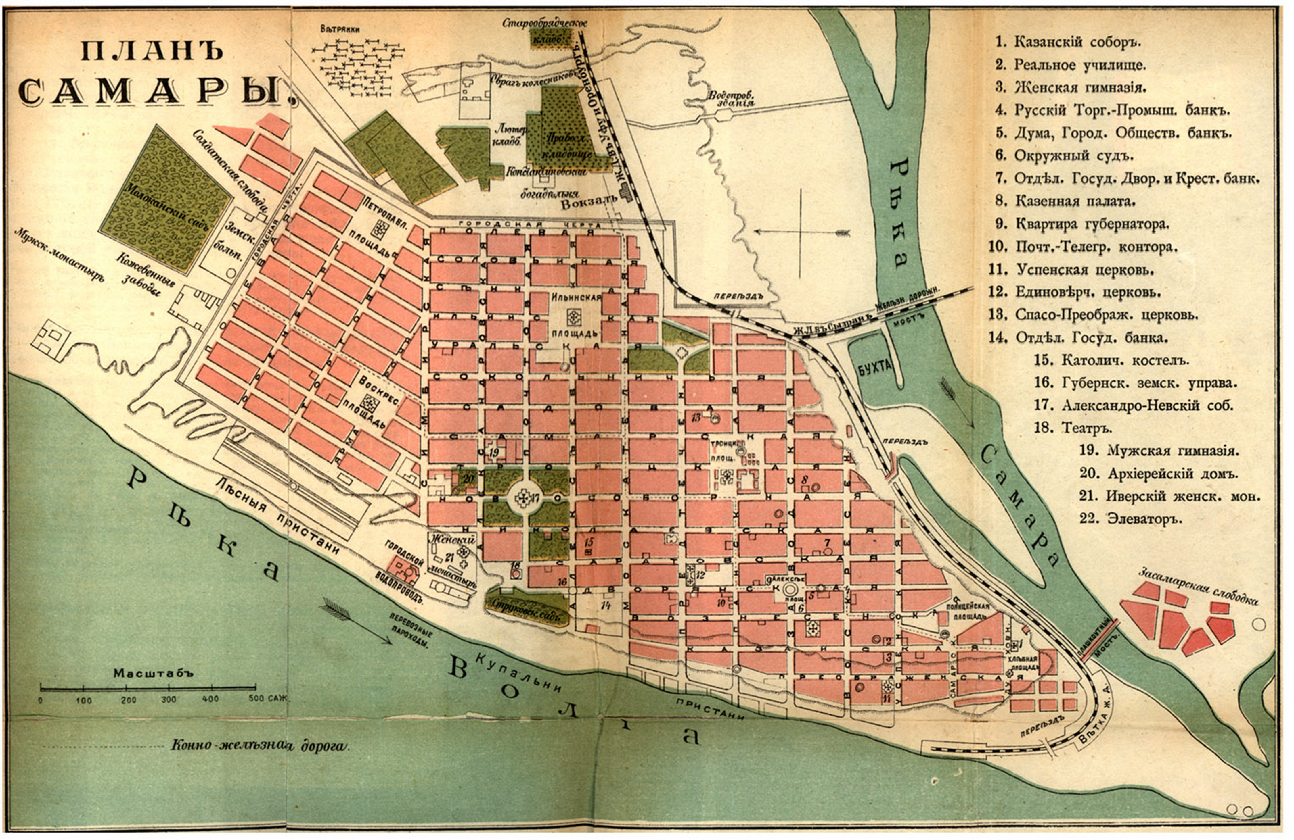 План Самары 1903 года. Безчинский А. "Путеводитель по Волге". - Москва: Т-во И.Н.Кушнерев и К°, 1903